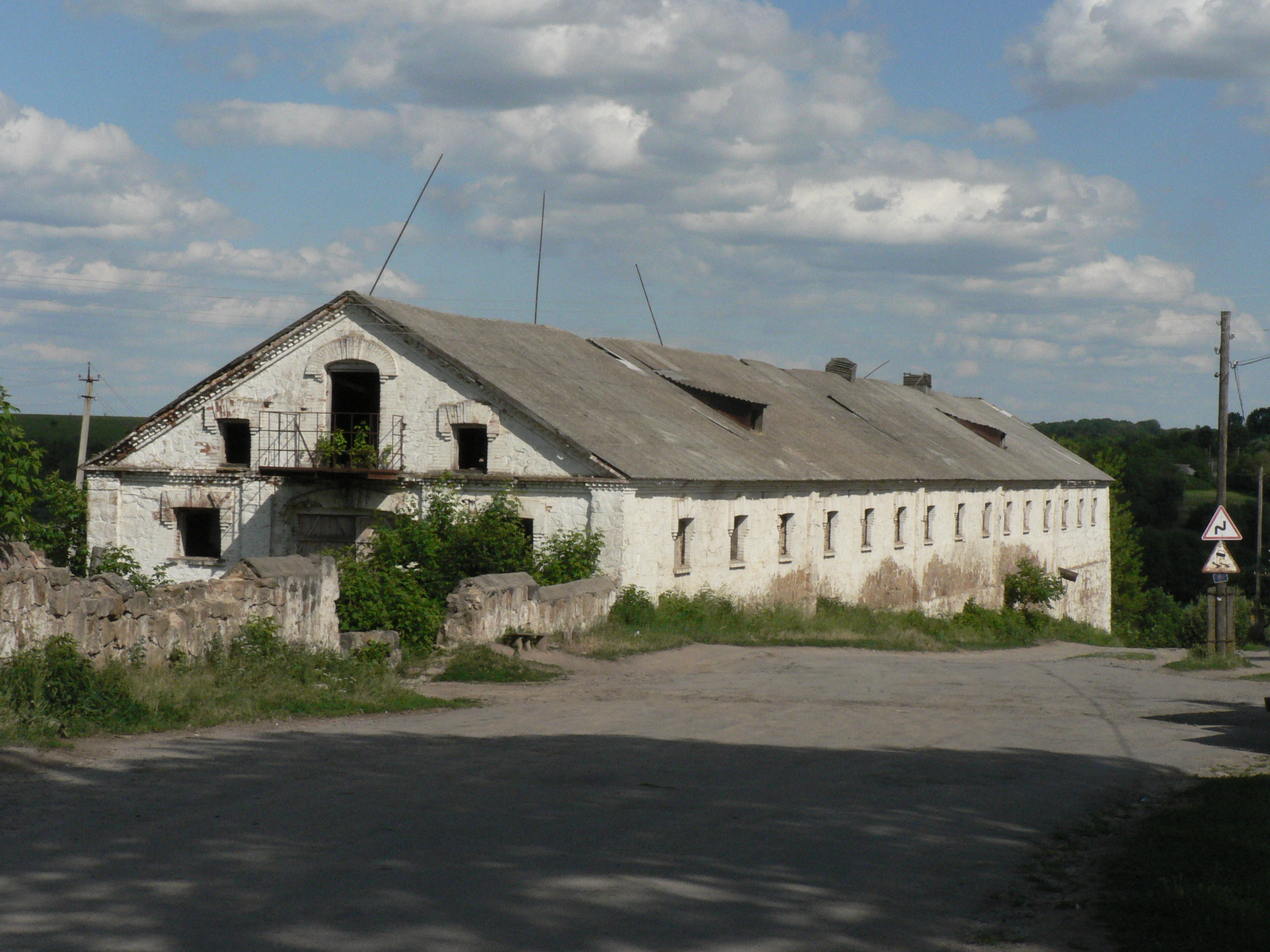 Конюшні пана Ярошинського в с. Дзвониха